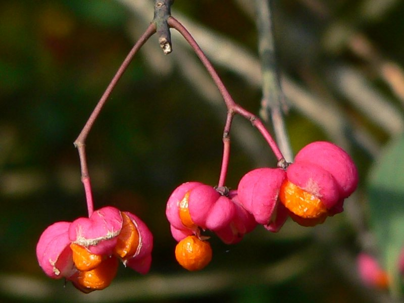 Früchte des Pfaffenhütchens (Gewöhnlicher Spindelstrauch, Euonymus europaeus)